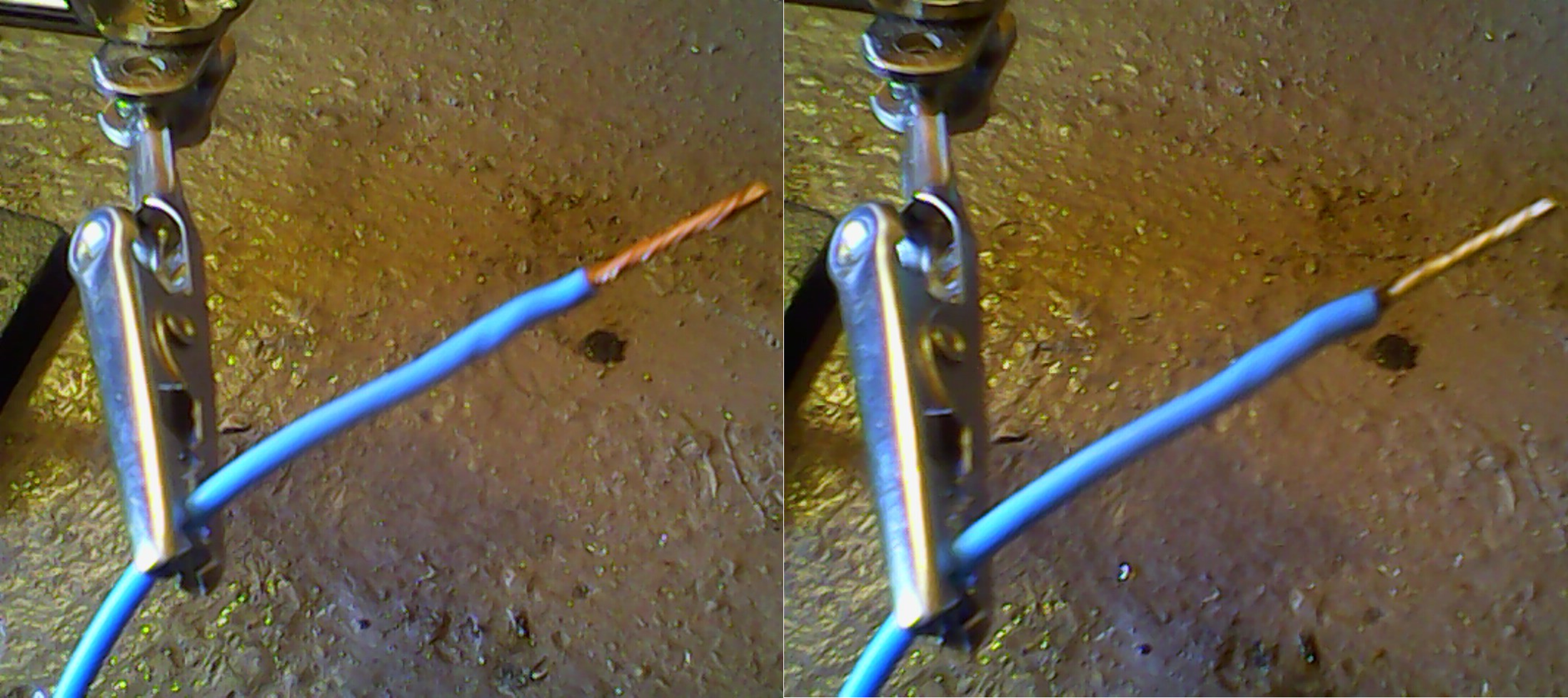 Медный провод до (слева) и после лужения (справа)